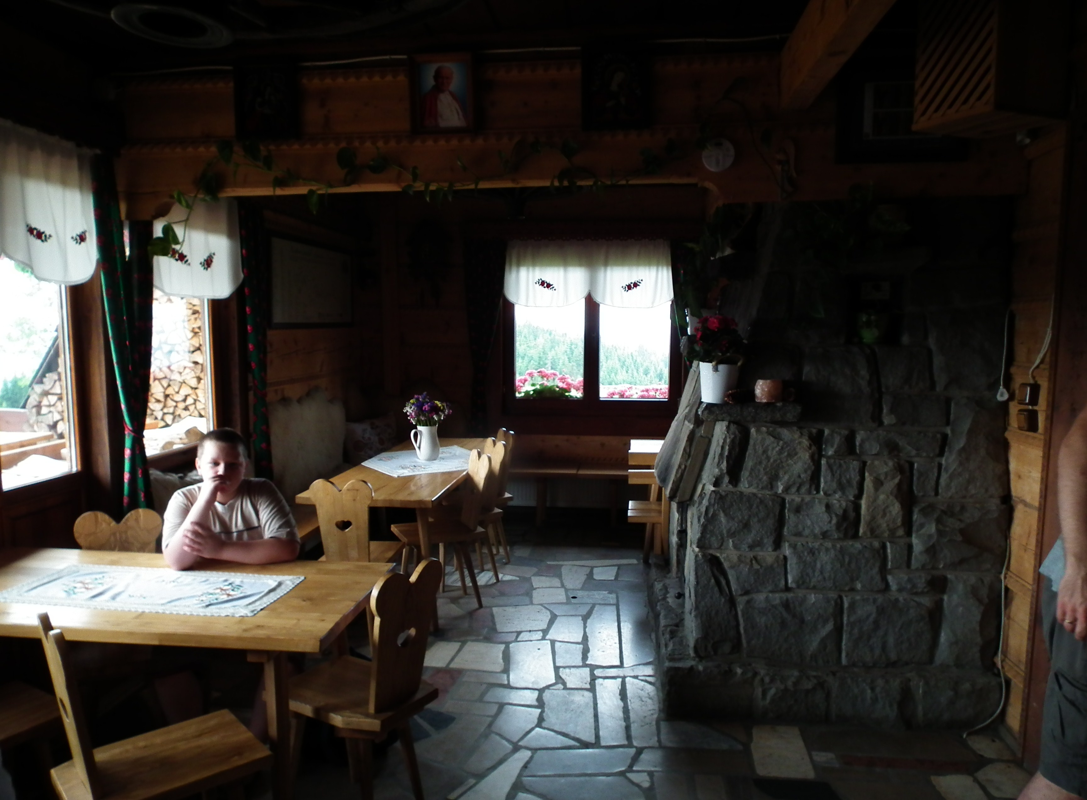 Bacówka na Maciejowej w Gorcach.